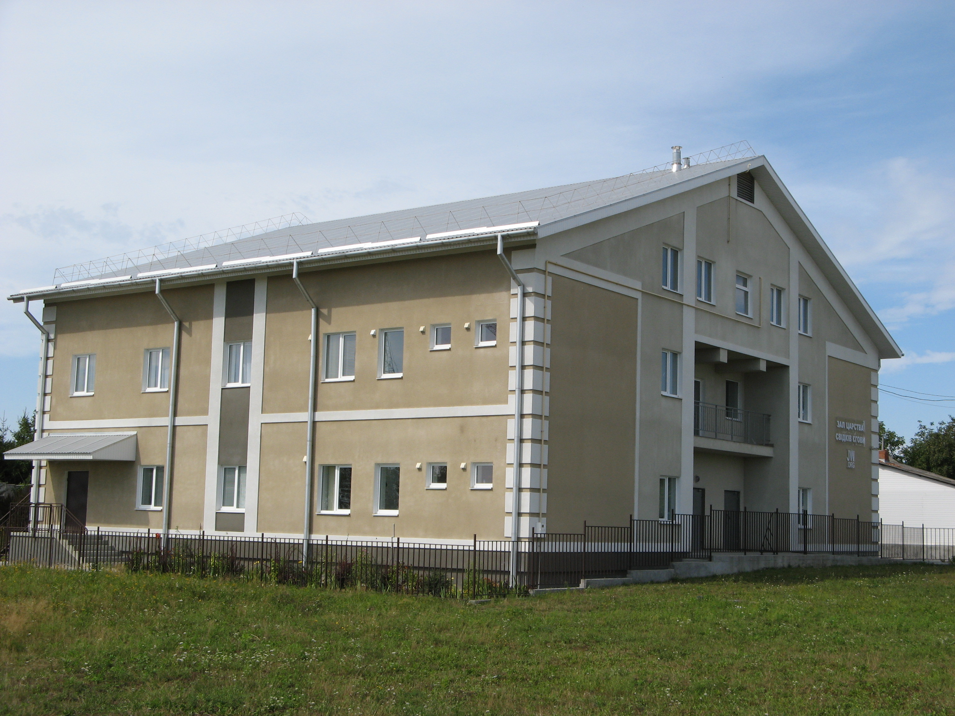 Зал Царства Свідків Єгови, Львів, вул. Щирецька, 33а